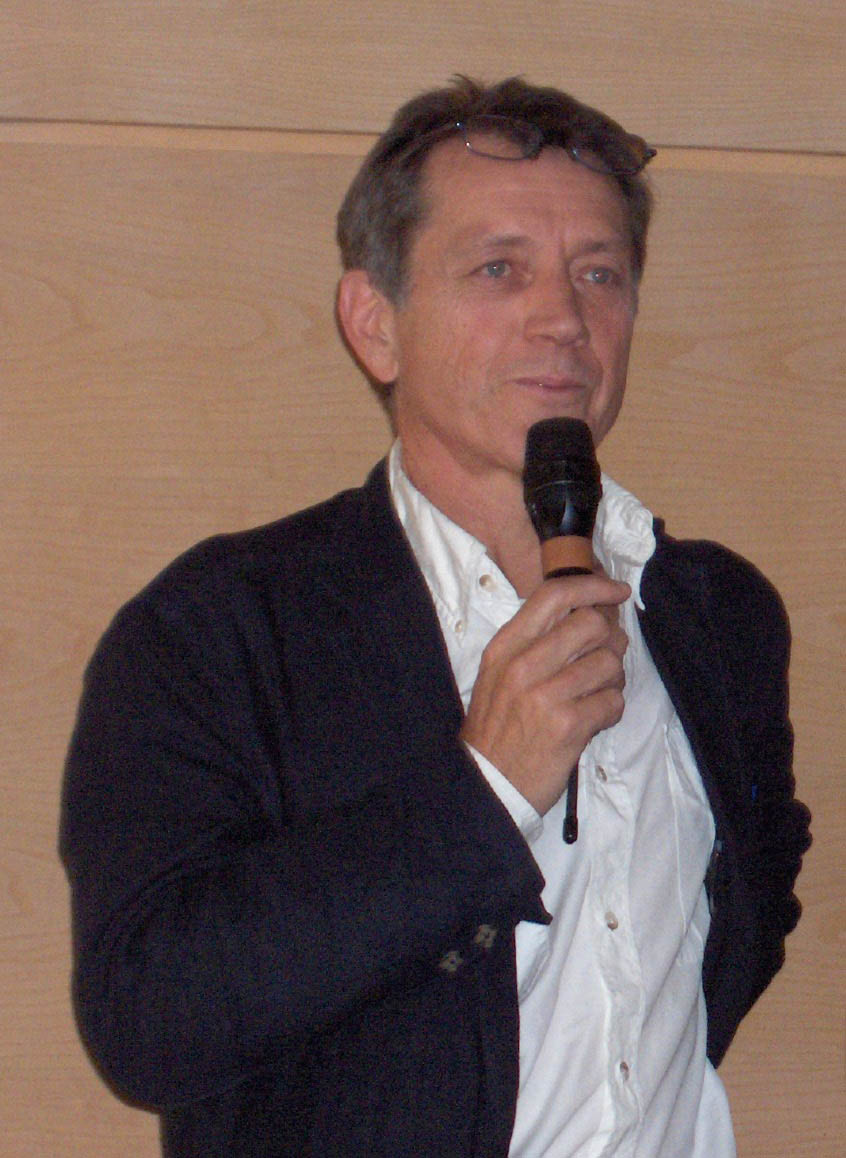 Bernard Giraudeau, acteur, réalisateur et écrivain français, lauréat du prix Amerigo-Vespucci au 18ème Festival international de géographie de Saint-Dié des Vosges en 2007